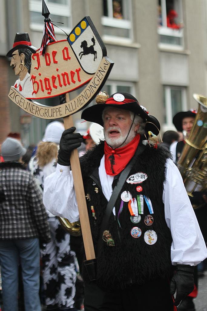 Karnevalszigeuner, Rosenmontagszug Mainz 2013